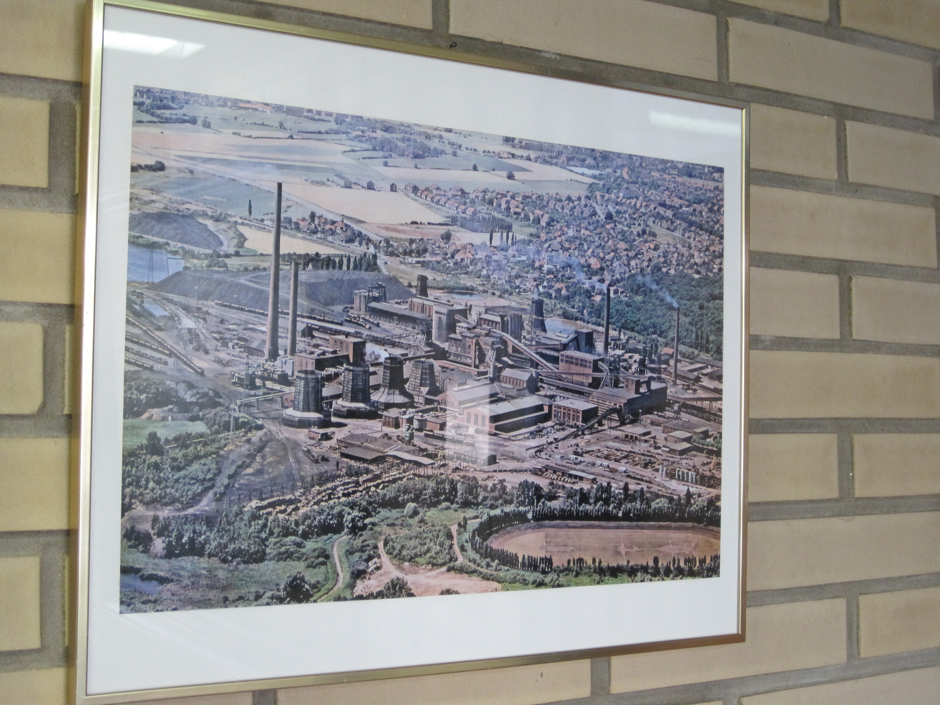 Das Foto zeigt ein Bild aus dem Rathaus Bockum-Hövel.